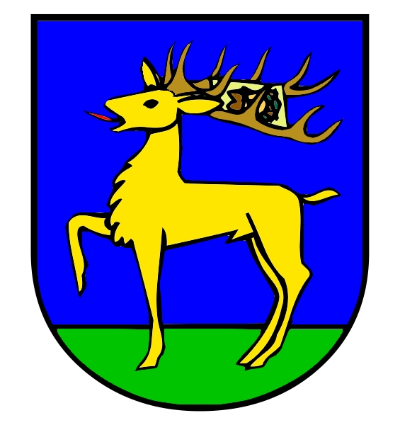 Wappen der Gemeinde Erstfeld. Ein Hirsch ziert das Wappen. Die Geschichte des Gemeindewappens hängt eng mit der Gründungslegende der Jagdmattkapelle zusammen.